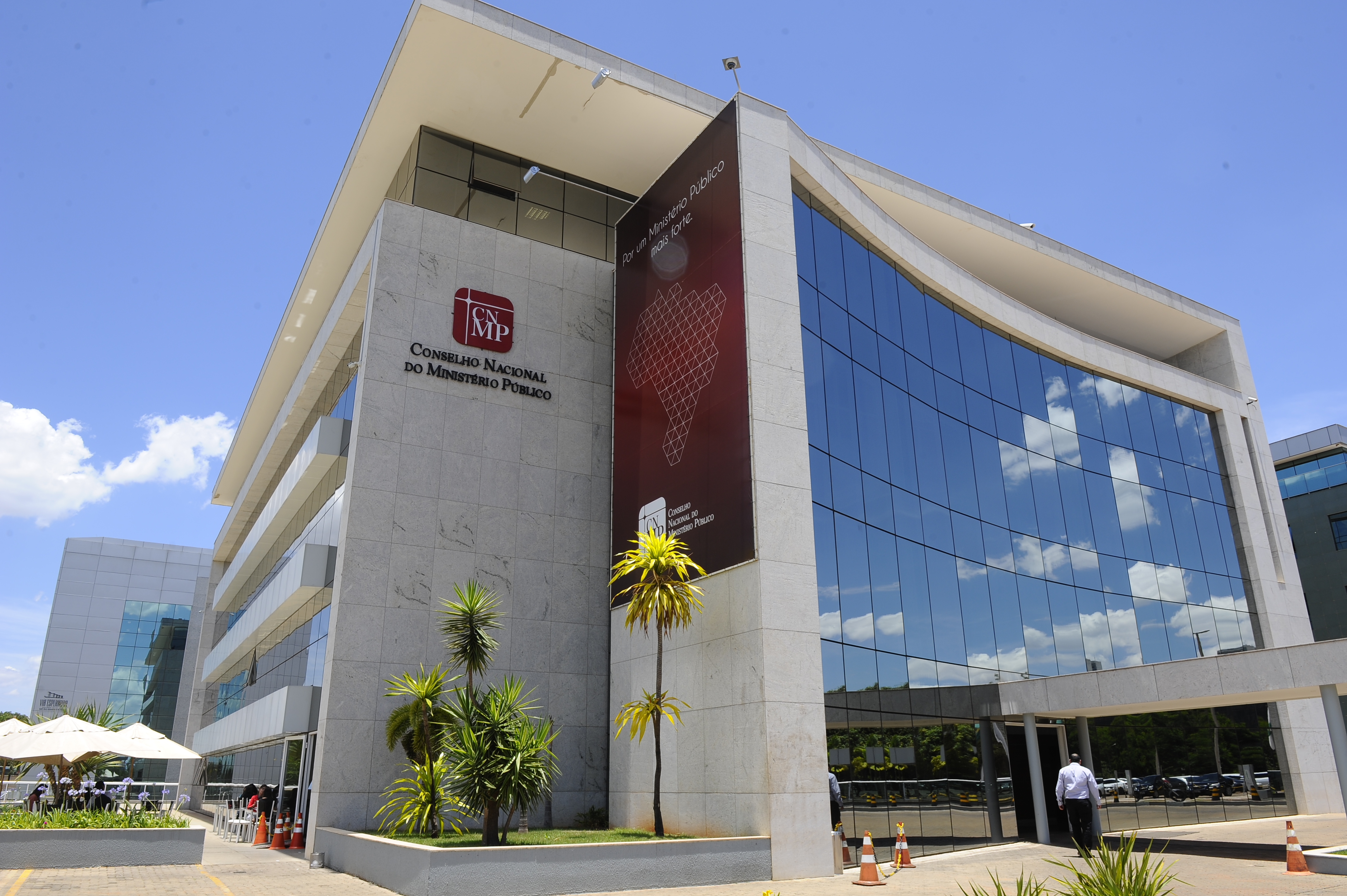 Especial Cidadania - Pessoas Desaparecidas - Procuradora de Justiça Ivana Farina e secretária de Direitos Humanos do Conselho Nacional do Ministério Público (CNMP), concede entrevista. Foto: Marcos Oliveira/Agência Senado